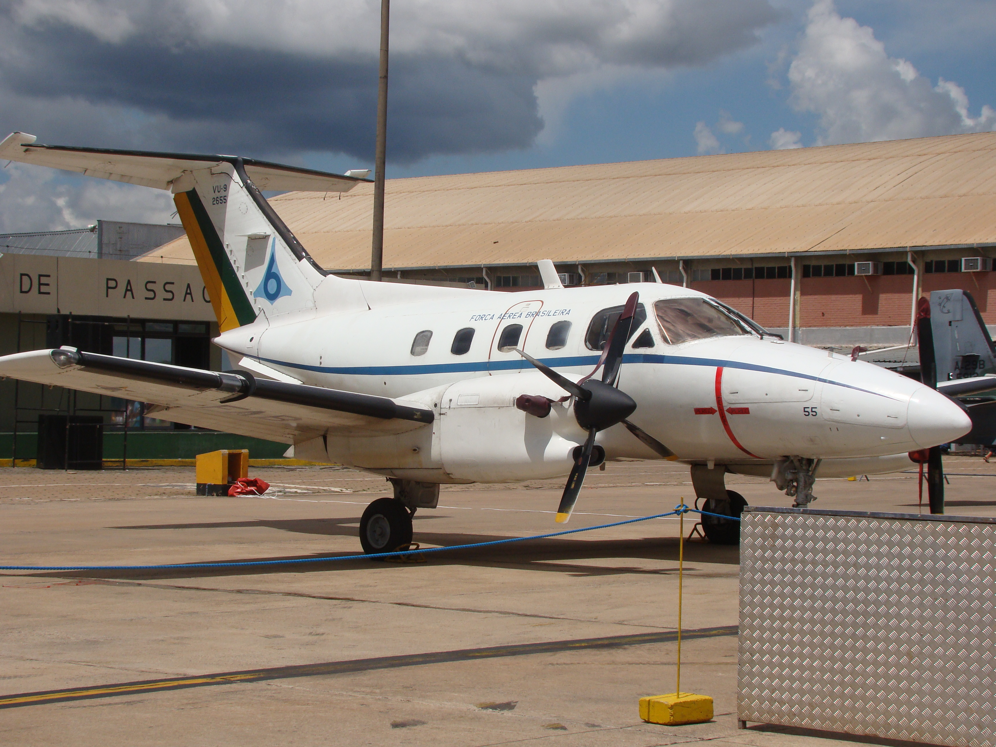 EMB-121 Xingu 6º Esquadrão de Transporte Aéreo Força Aérea Brasileira